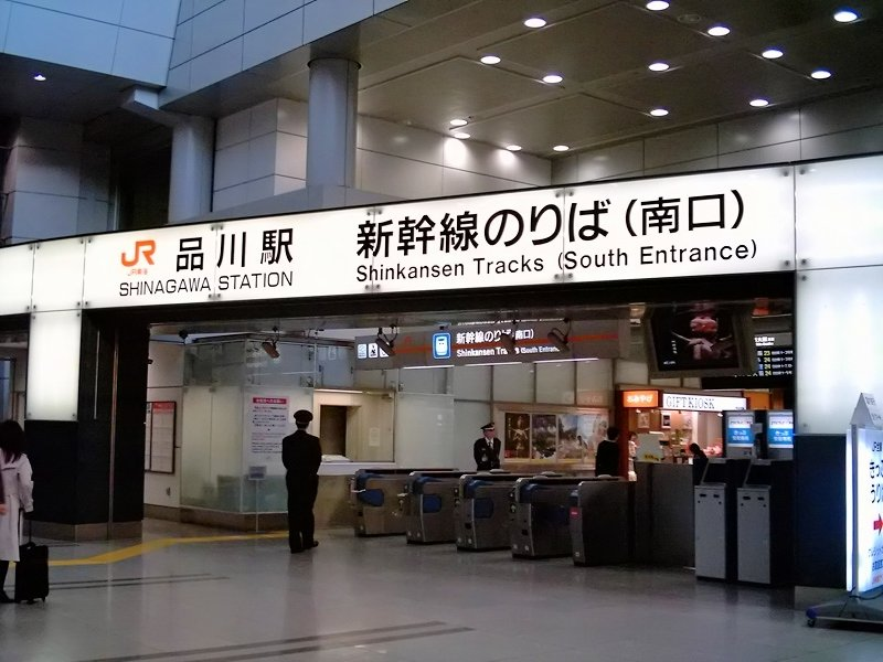 Shinagawa_Station 2007